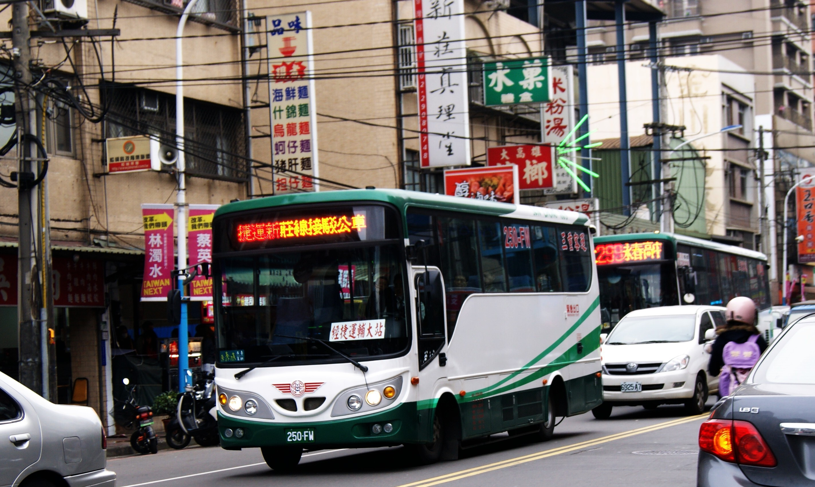 三重客運現代Mighty大客車250-FW，行駛台北捷運新莊線接駁公車。